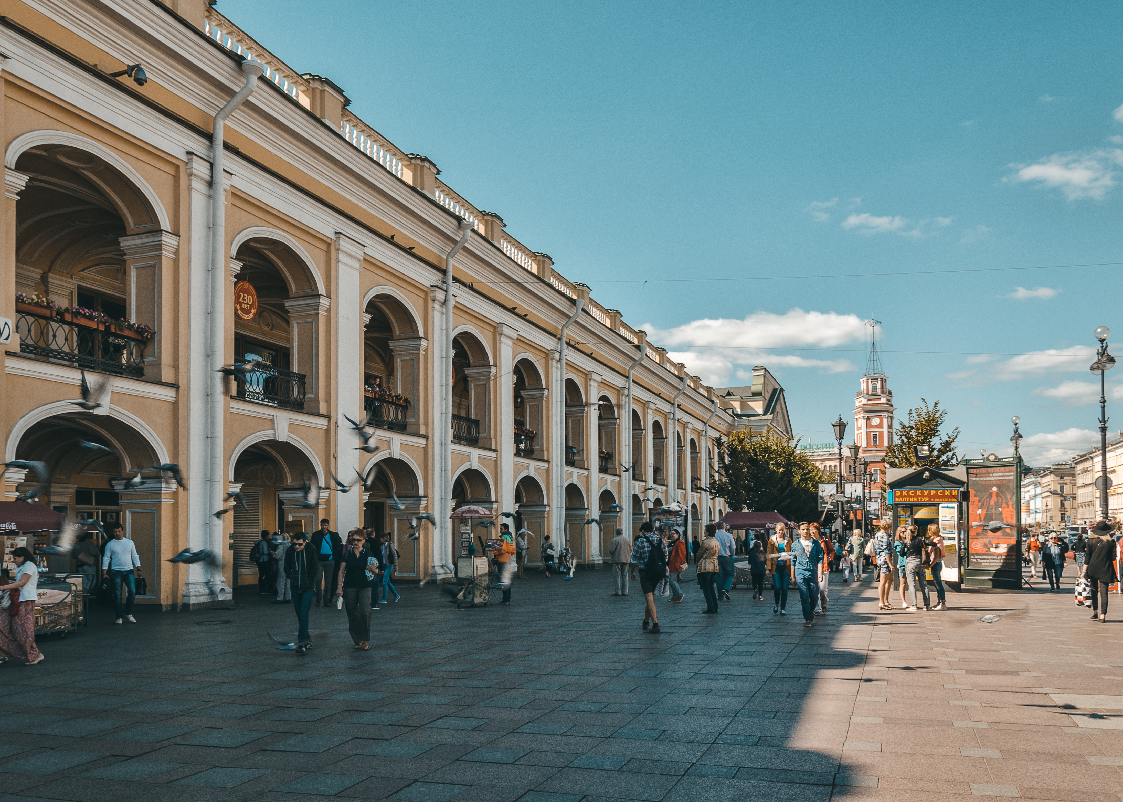 Большой Гостиный двор: Невский проспект, 35 (литеры), Садовая улица, 17, улица Ломоносова, 4, Думская улица, Центральный район, Санкт-Петербург